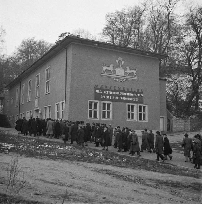 Das ehemalige Linzer Gasthaus Märzenkeller (Bockgasse 2a). Die Personen im Vordergrund sind Delegierte einer Betriebsdelegiertenkonferenz der KPÖ. Die Aufschrift des Banners lautet: Allg. Betriebsdelegiertenkonferenz gegen die Kriegslohnsteuer.